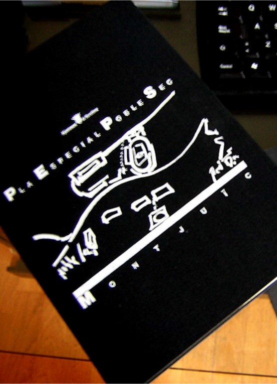 PERI PEPSM